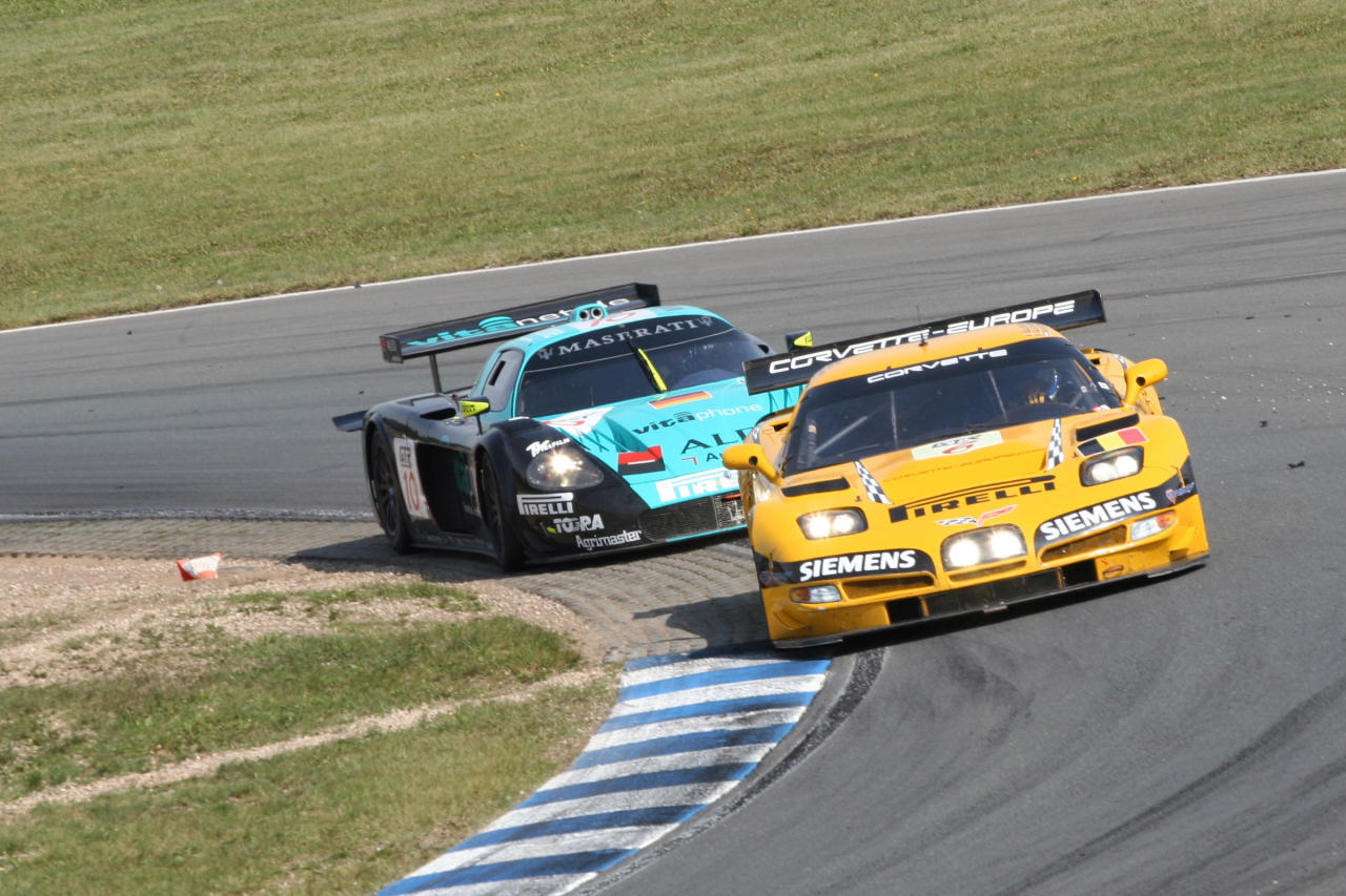 Corvette C5R und Maserati MC12, Oschersleben 28.08.2005